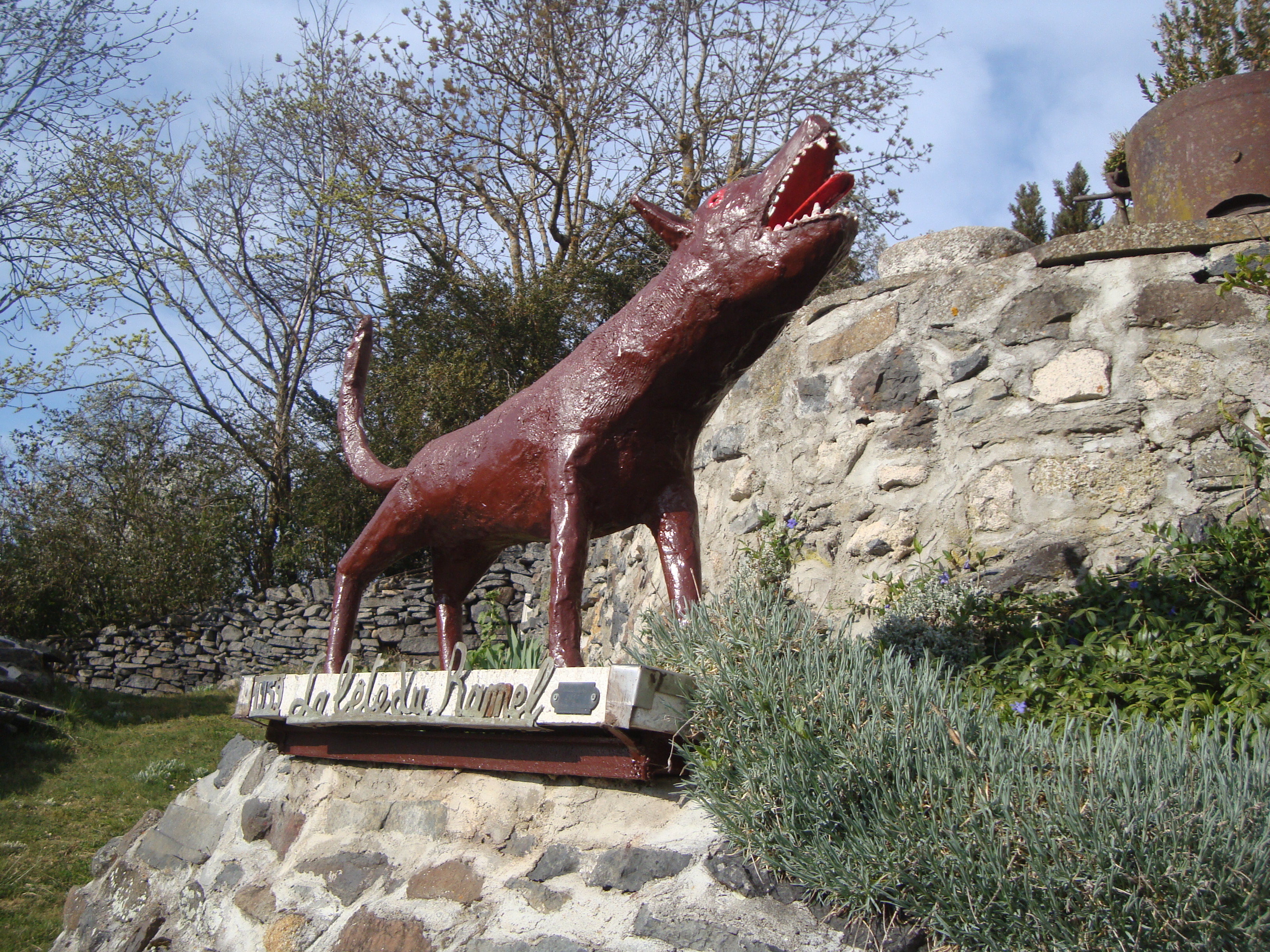 Sculpture représentant la bête du Ramel au village d'Arzilhac (Beaux, Haute-Loire, France)